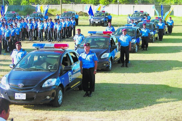 Policia de Nicaragua